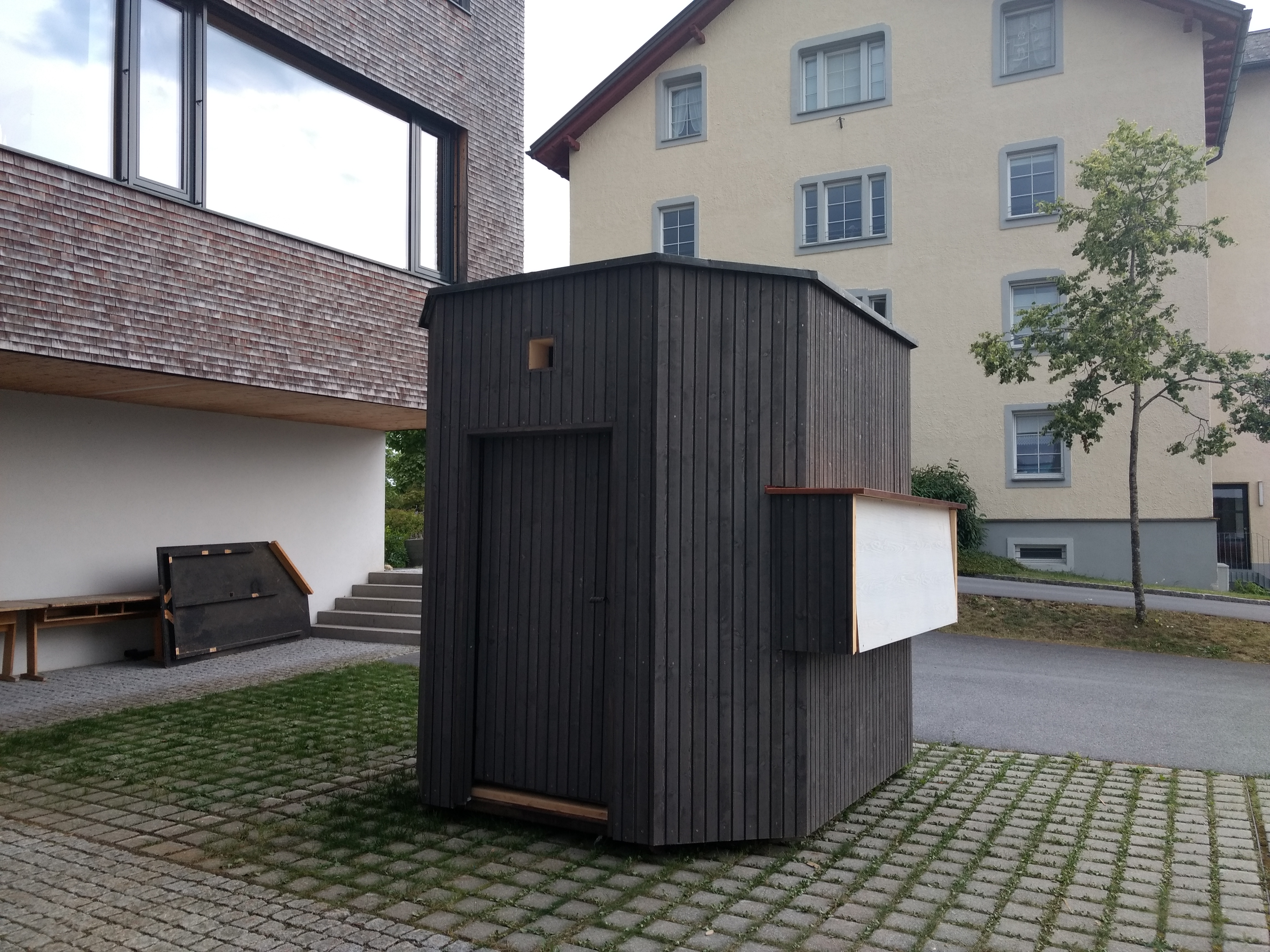 ehemaliges Kassenhäuschen des Brüggelekopfliftes. Umgebaut durch die Mittelschule Alberschwende